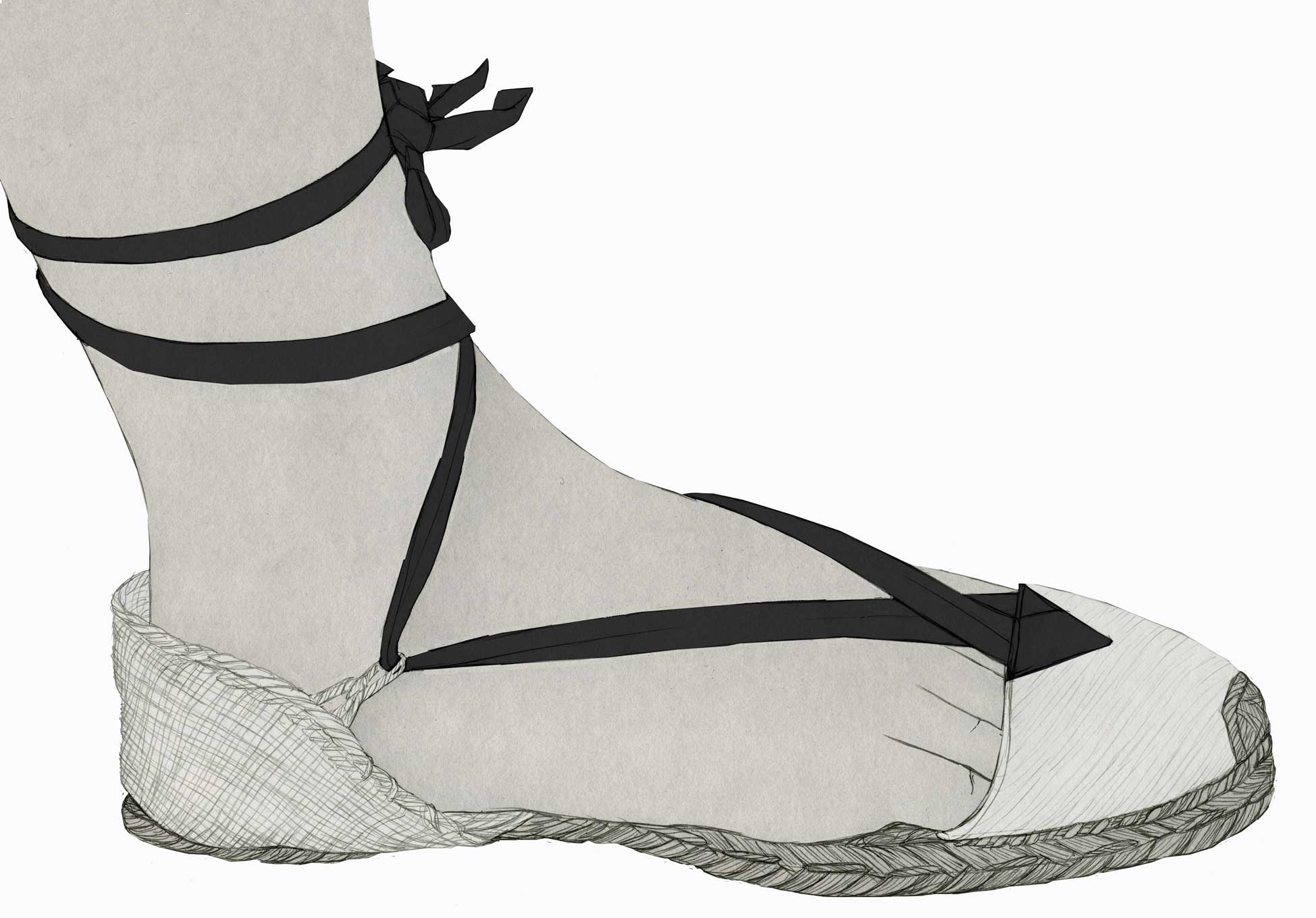 Imatges de l'exposició permanent "Horta i Marjal". Esta imatge, originàriament dissenyada per a l'exposició, no està en sala.